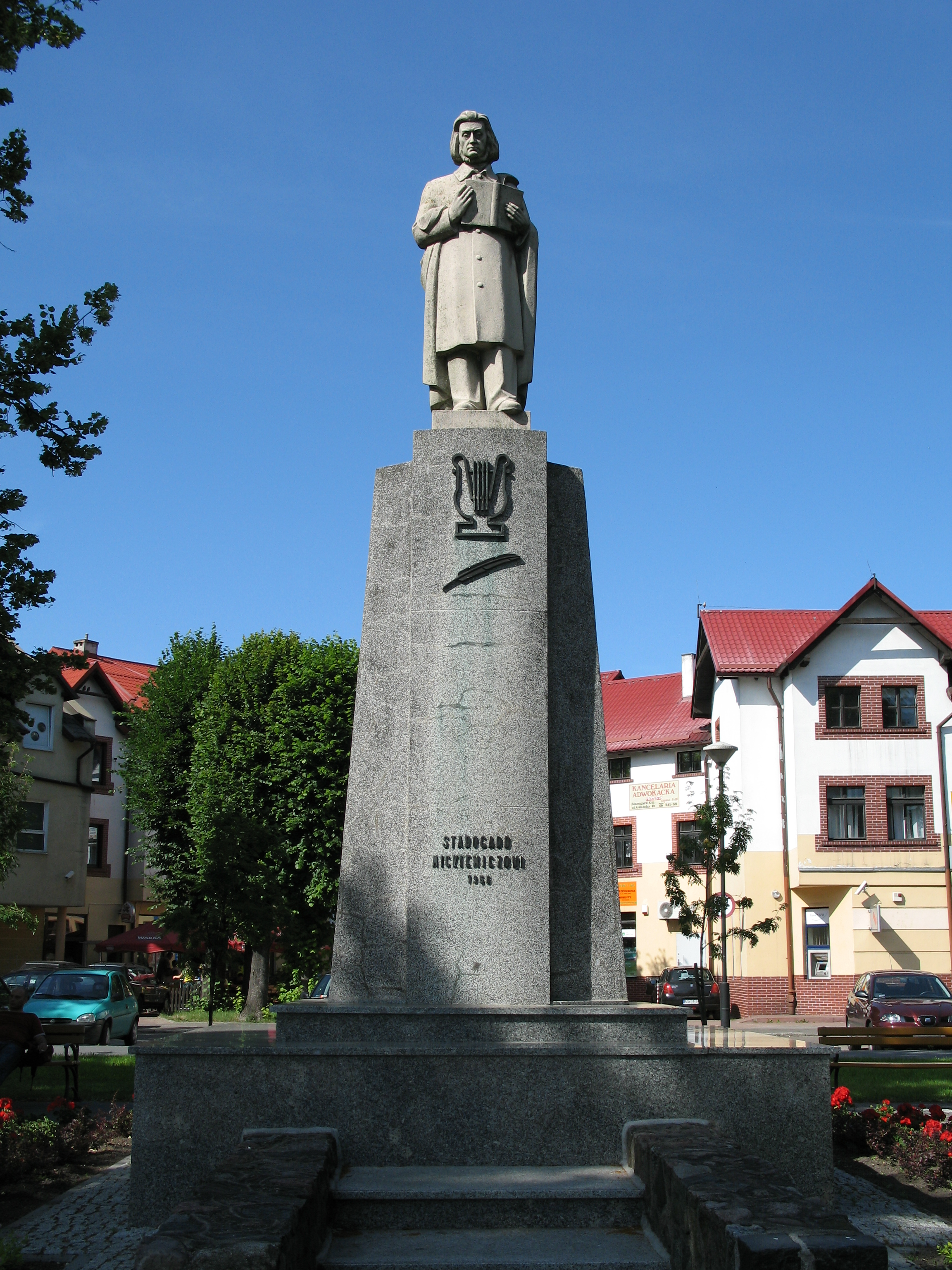 Pomnik Adama Mickiewicza w Starogardzie Gdańskim ustawiony na skwerze przy końcu Alei Wojska Polskiego. Ujęcie w całości.